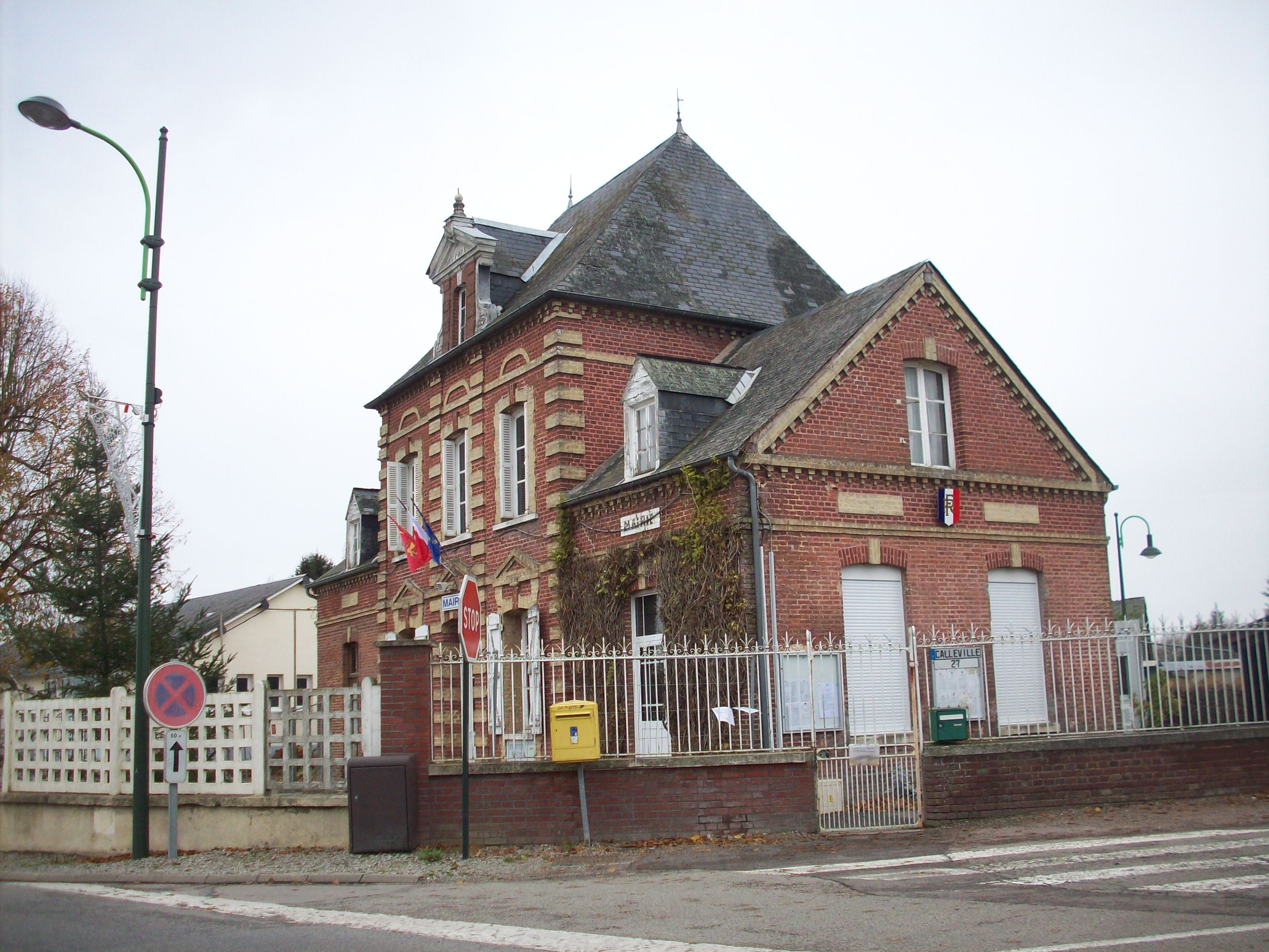 Mairie de Calleville.